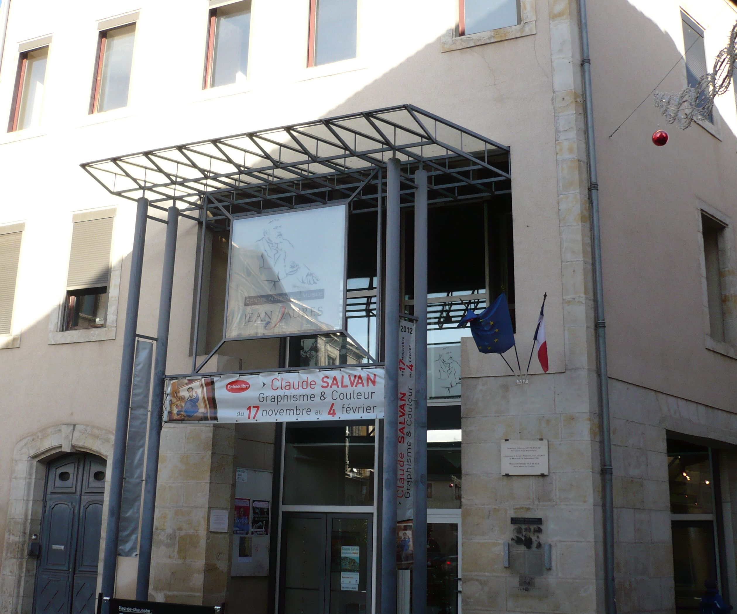 Castres